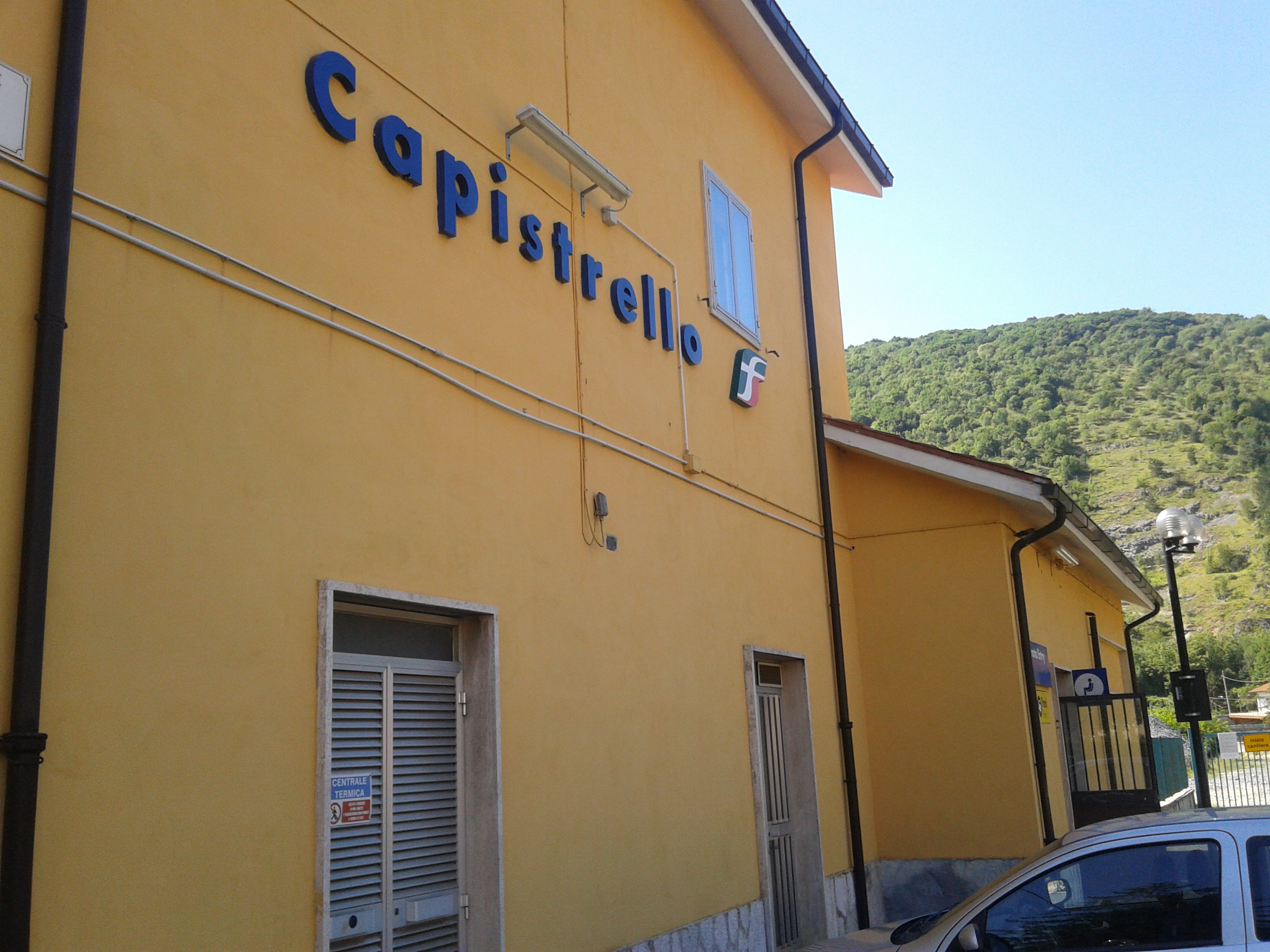 Stazione ferroviaria di Capistrello